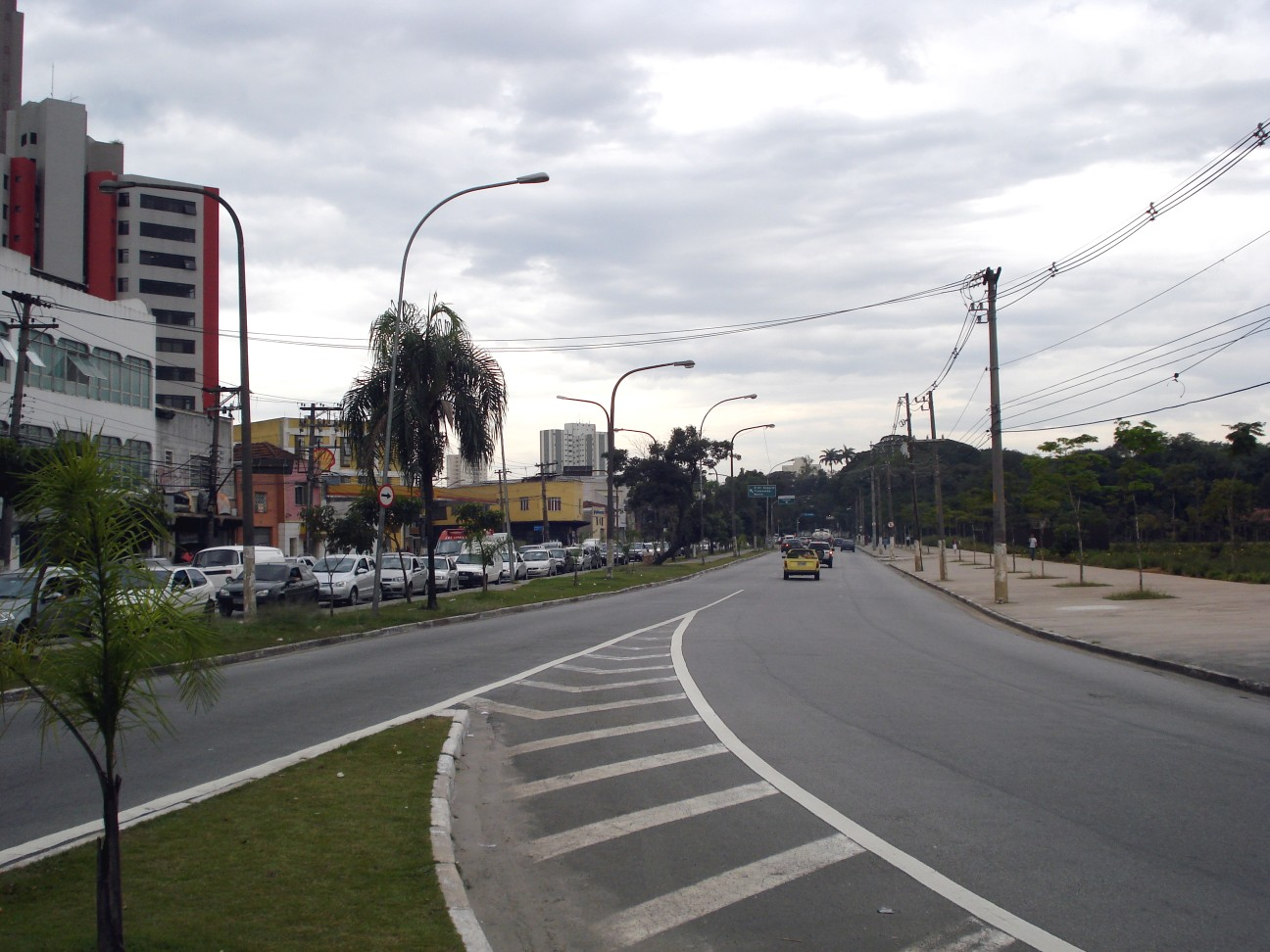 Trecho da avenida General Ataliba Leonel, em Santana, zona norte da cidade de São Paulo, SP. À direita, vegetação do Parque da Juventude.